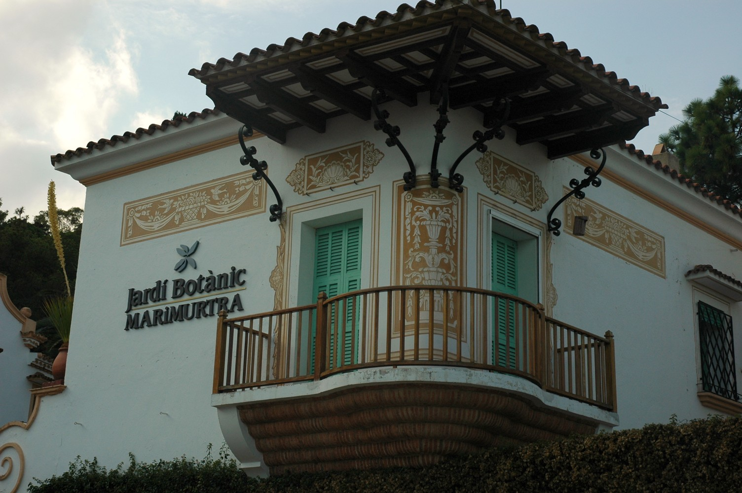 Entrada del jardí botànic Marimurtra de Blanes